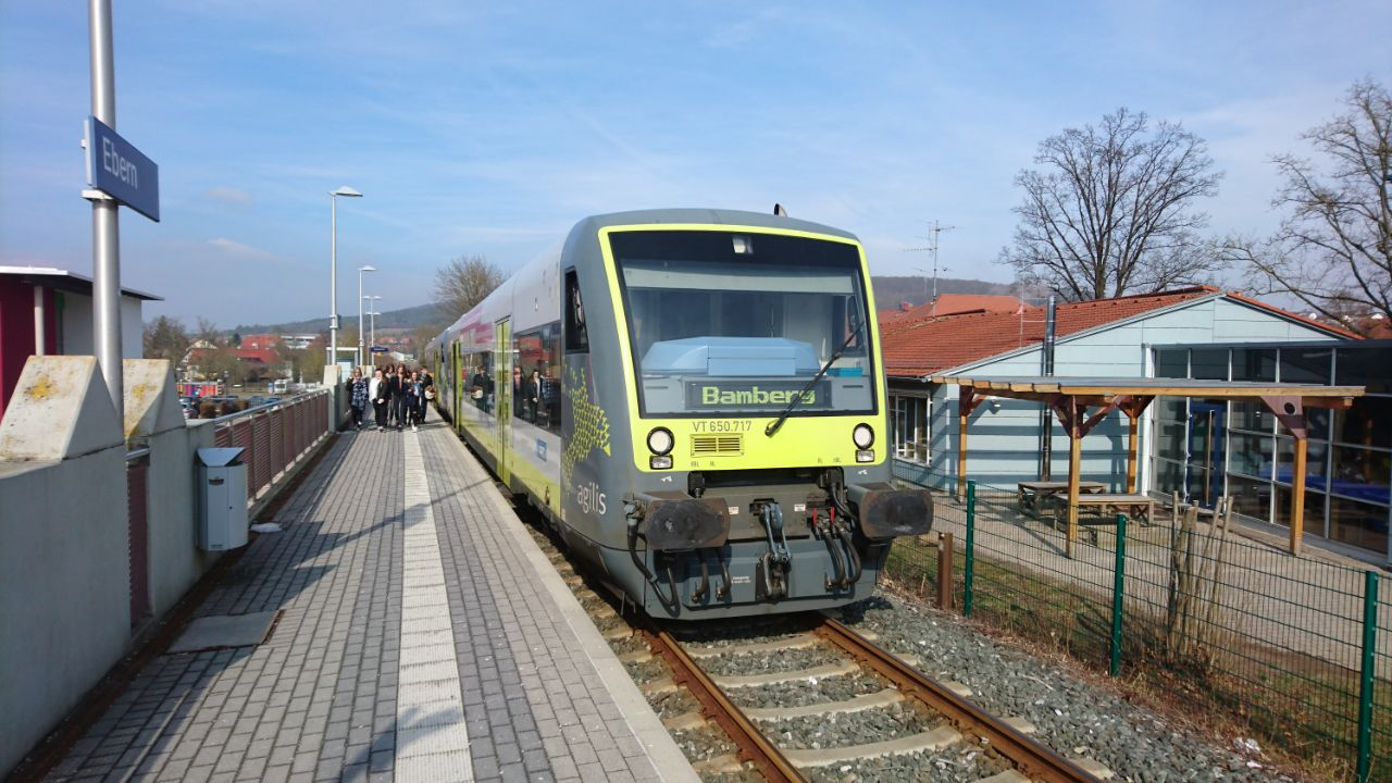 agilis 84469 steht in Ebern (Bild)